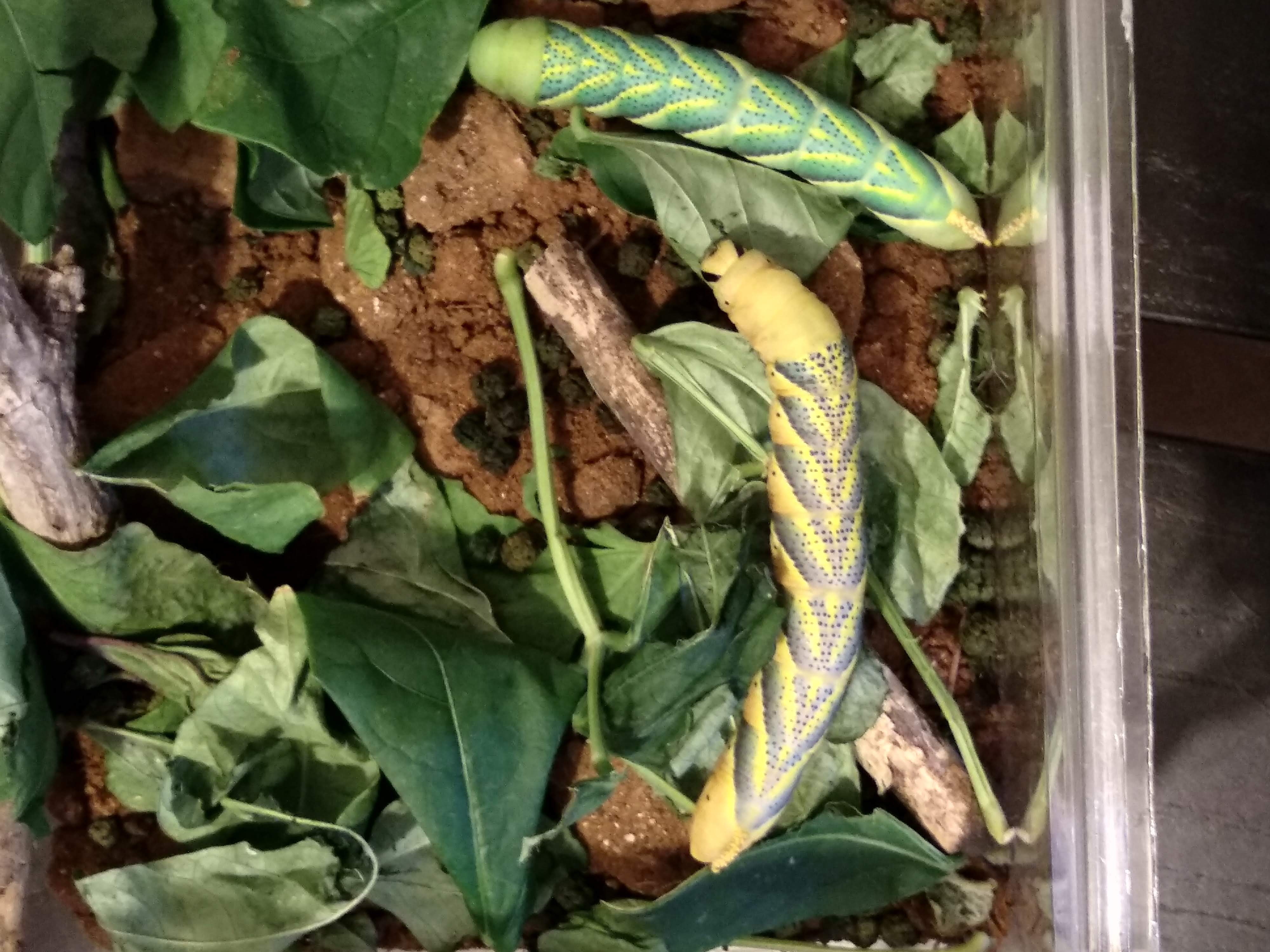 זוג זחלים, הירוק צעיר, הצהוב בוגר.